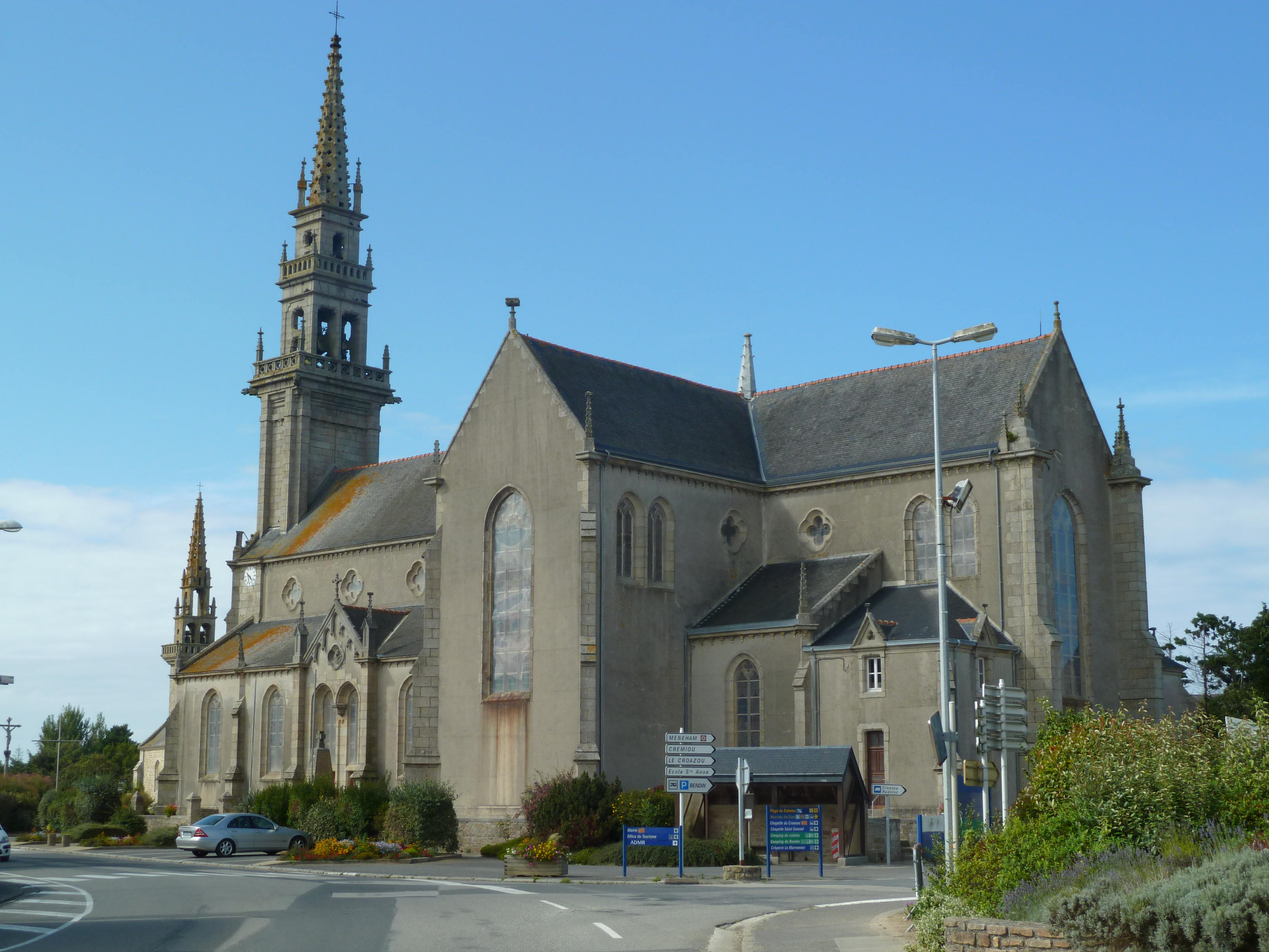 Eglise Saint-Brévalaire à Kerlouan